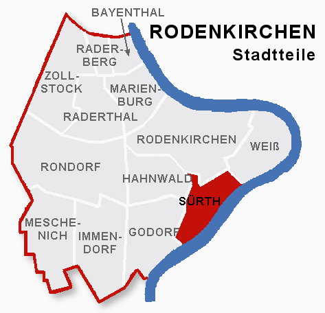 Lage des Stadtteils Sürth im Stadtbezik Rodenkirchen